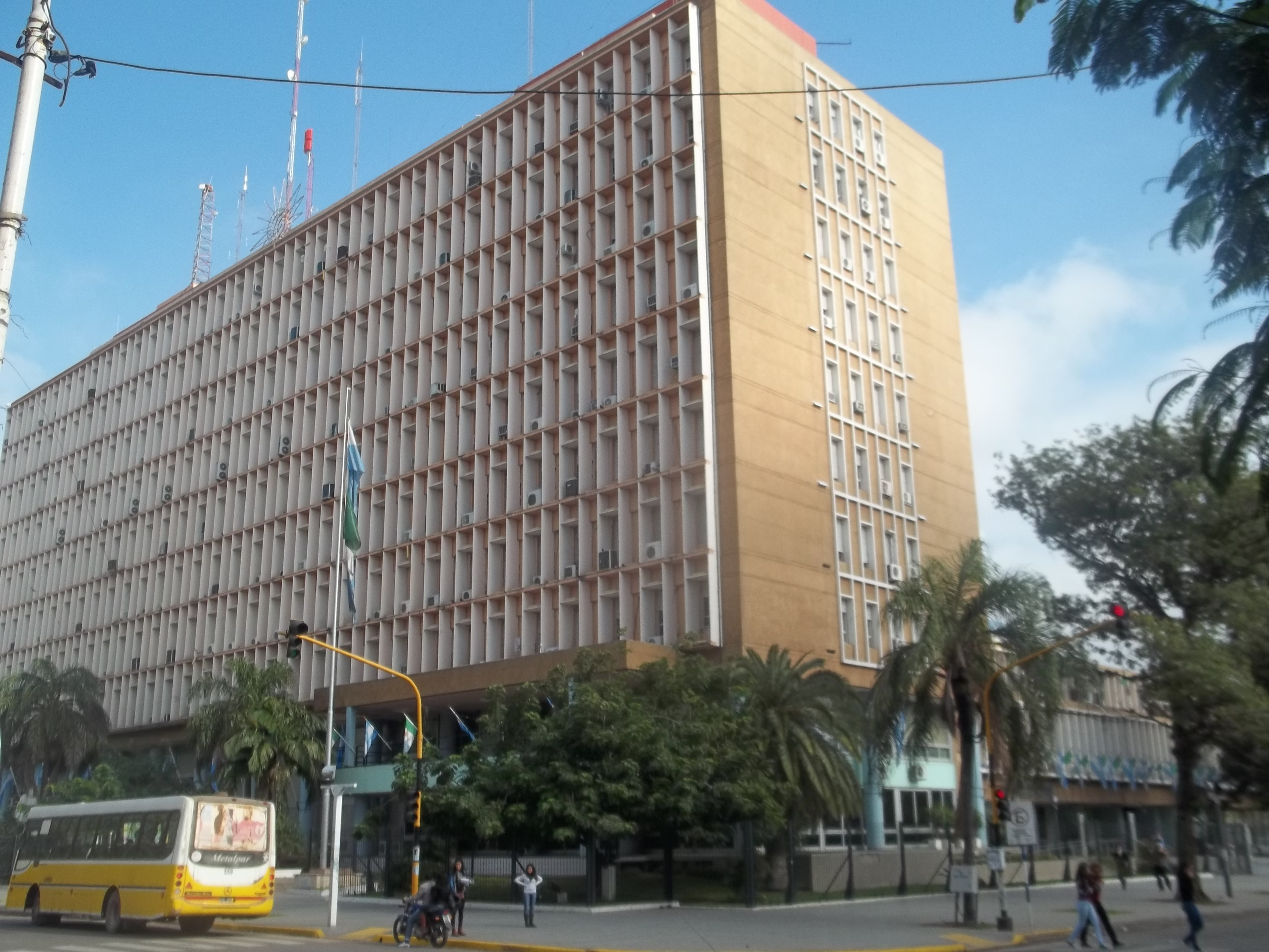 Vista de la Casa de Gobierno de la Provincia del Chaco vista desde la vereda de la Casa de las Culturas (calle Marcelo T. de Alvear frente a la plaza 25 de Mayo)